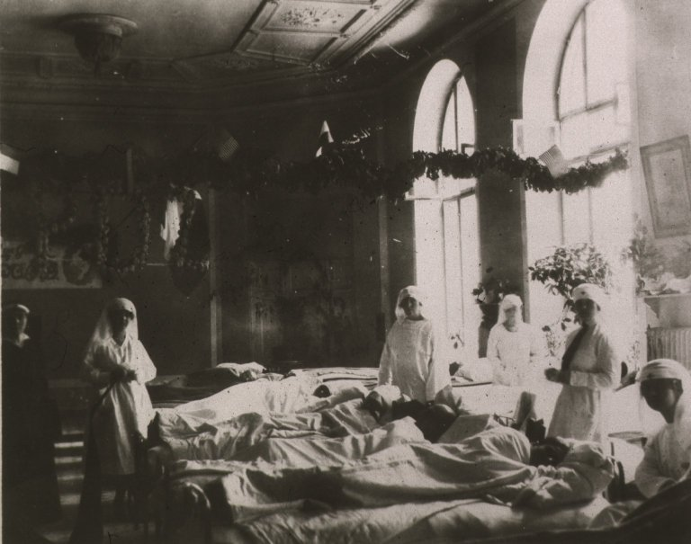 Polish Typhus Relief Commission Ward in Grace Hospital, Warsaw, Poland.